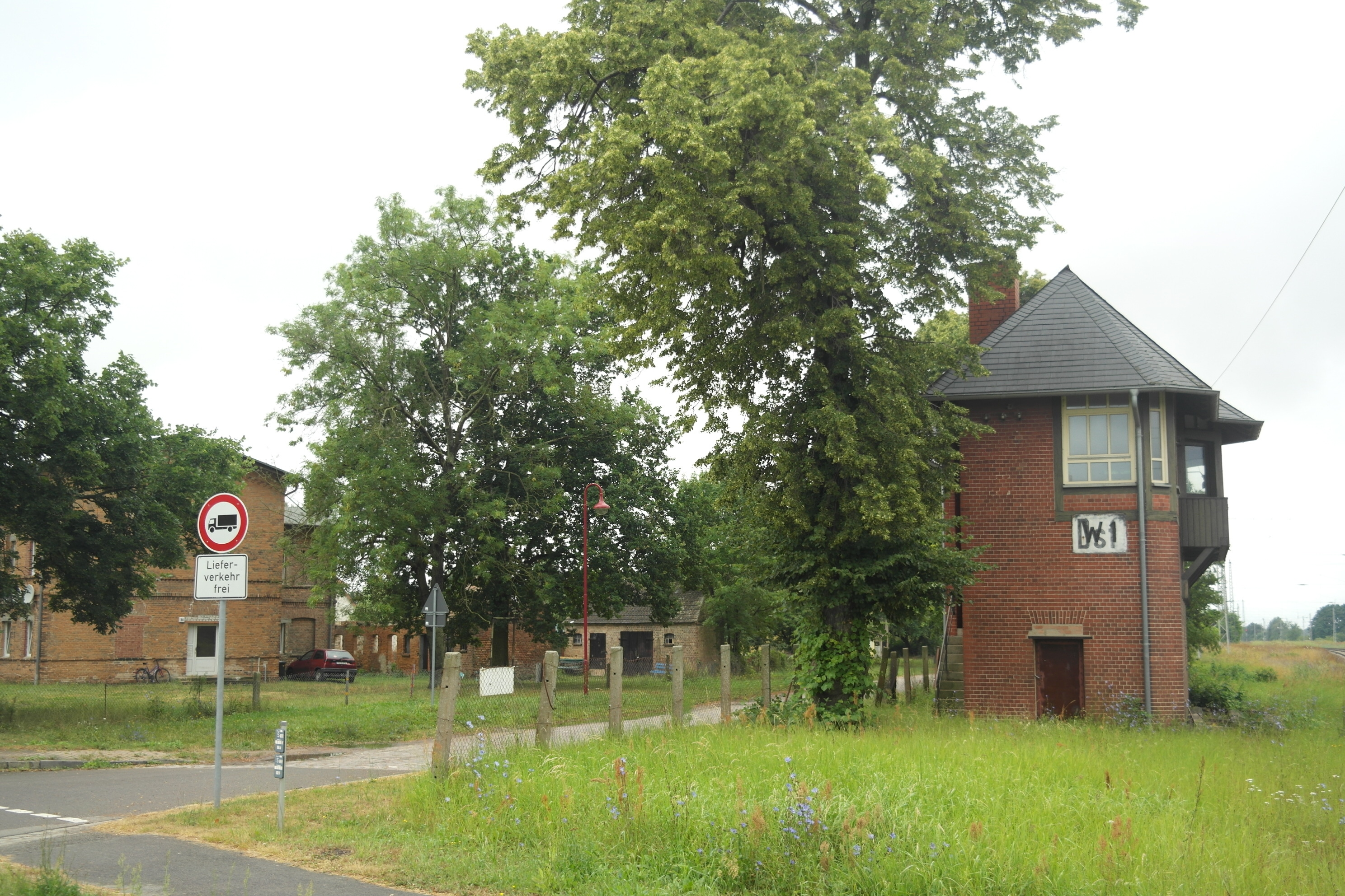 Bahnhof Ducherow, alter Bahnhof, Baudenkmal, Stellwerk